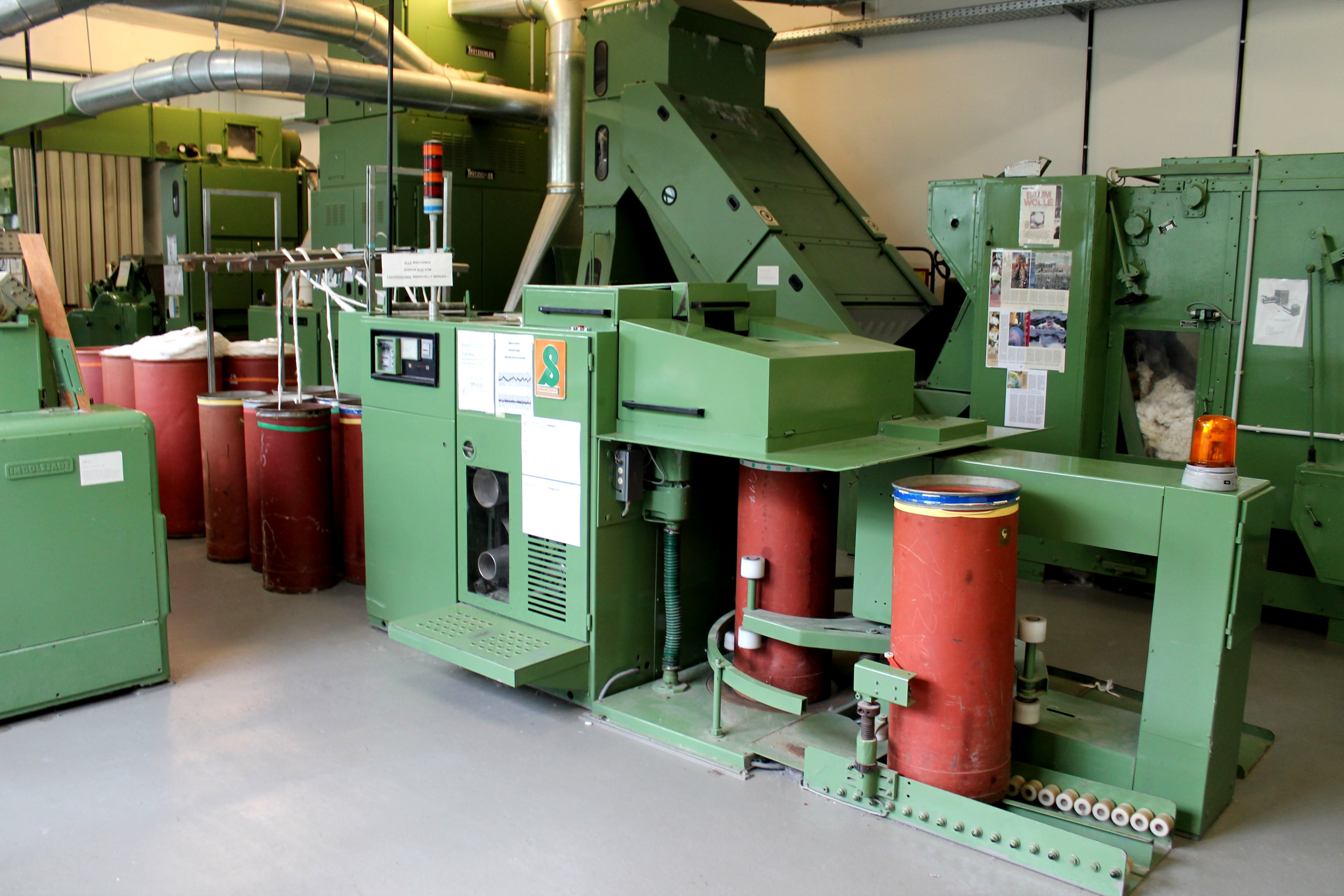 Baumwollstrecke Baujahr ca 1975